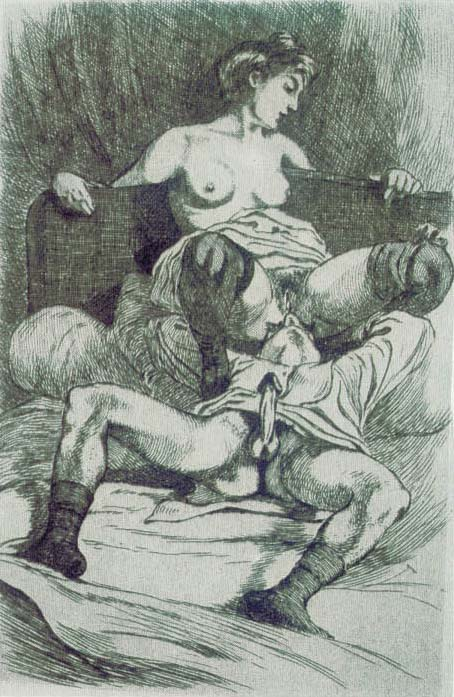 Dessins de Martin van Maële. Illustration d'un poème de Paul Verlaine. 1907.